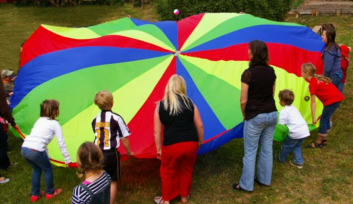 Schwungtuch, "Popcornspiel"